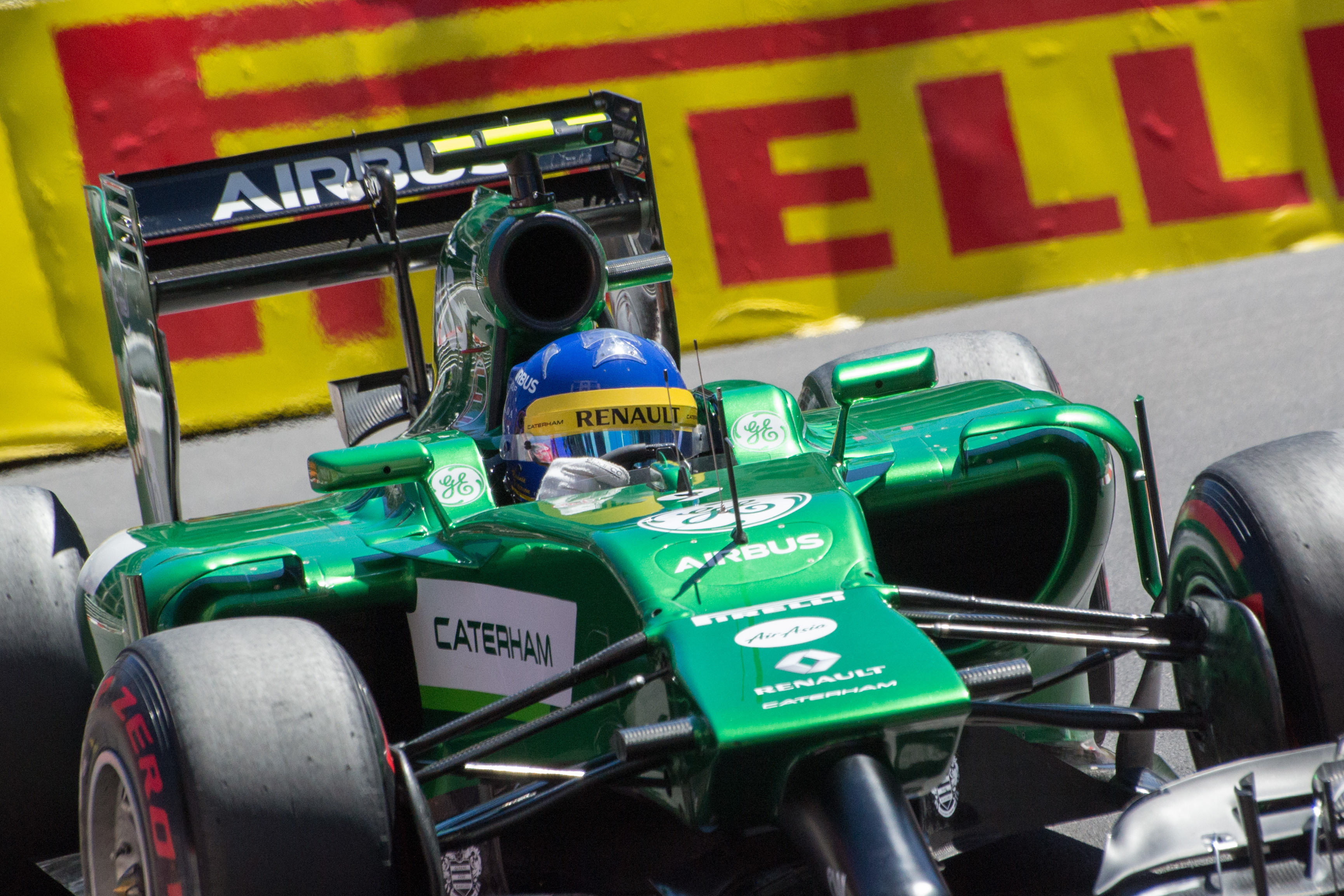 Marcus Ericsson - Caterham-Renault - 2014 Monaco Grand Prix